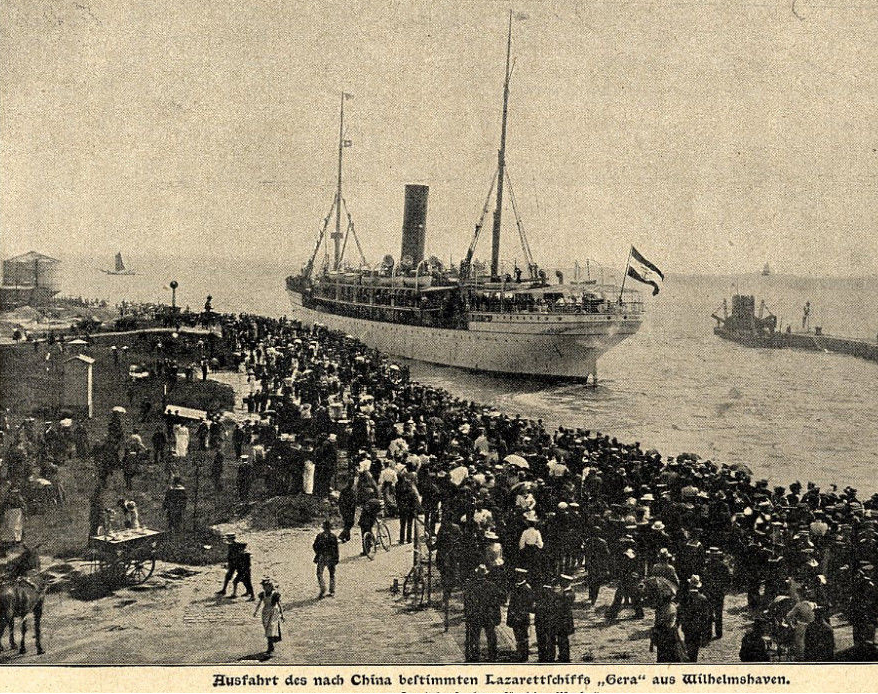 Ausfahrt des nach China bestimmten Lazarettschiffs 'Gera' aus Wilhelmshaven, 1900